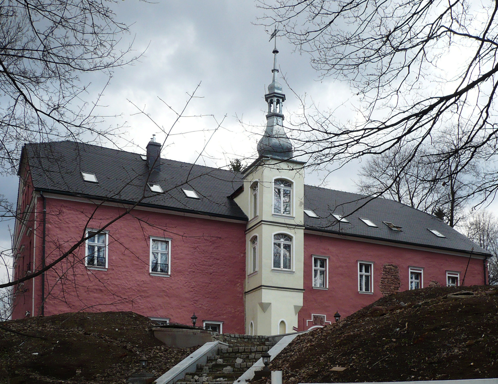 Nowa Ruda, ul. Kościelna 30 - Dwór Górny, obecnie hotel, XVII, XIX w. (zabytek nr A/940/652/WŁ z 25.05.1977)